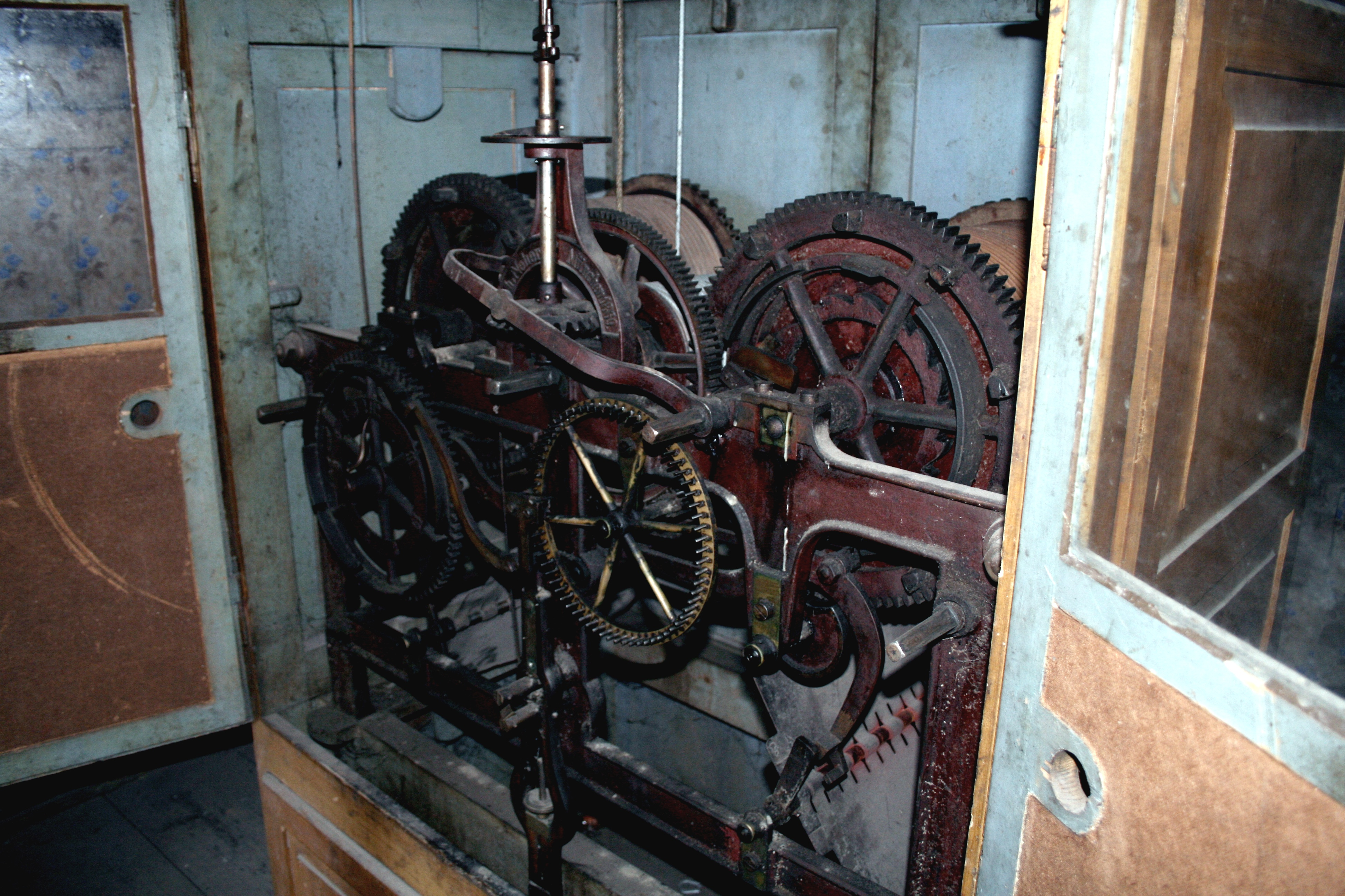 Altes Aufzieh-Uhrwerk, Unser Frauen (Memmingen)